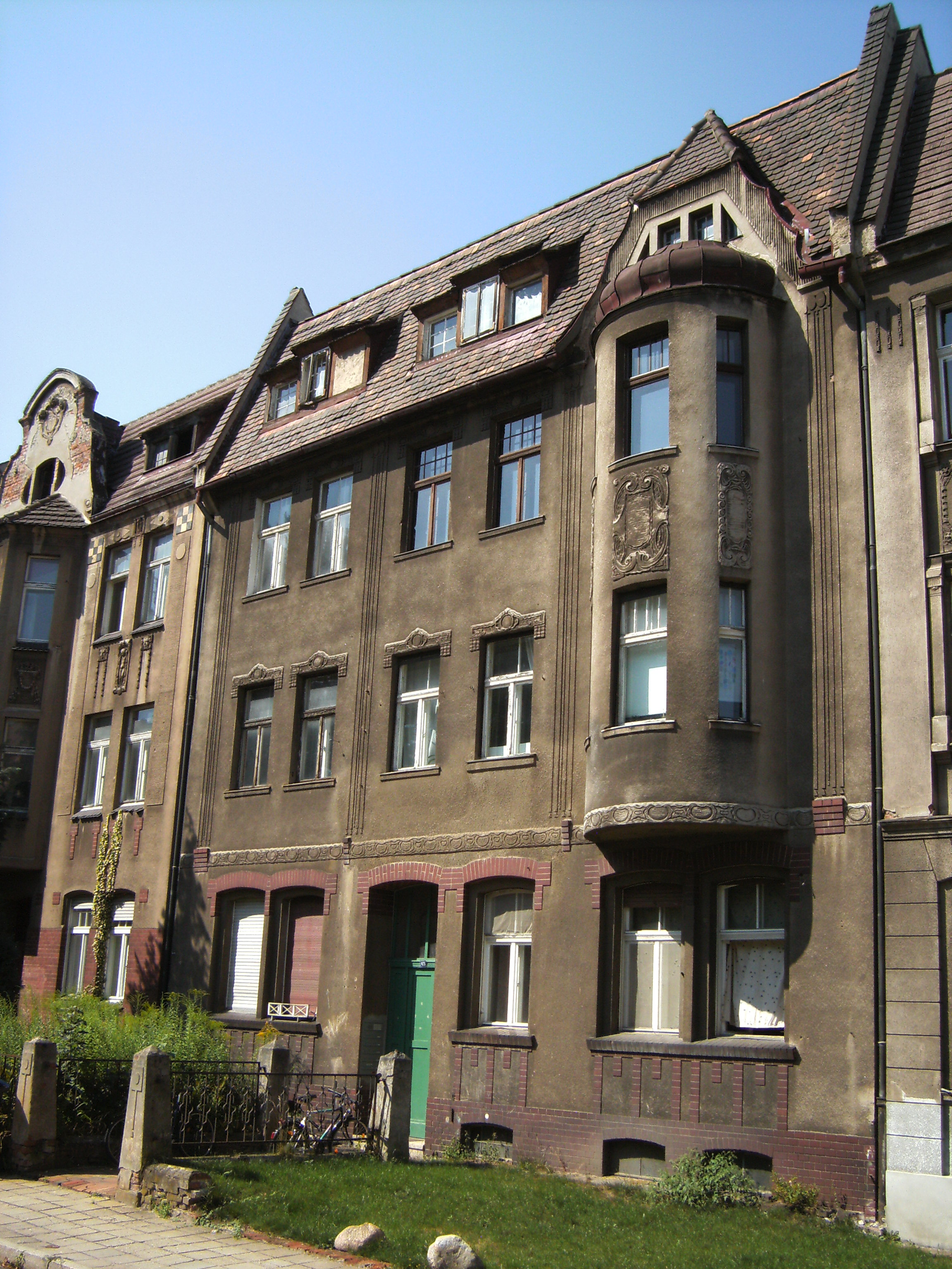 Wernerstr. 43